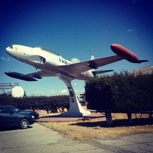 Julio 2014, Base Aérea Bartolina Sisa, El Alto, Bolivia. July 2014, Bartolina Sisa Air Base, El Alto, Bolivia.